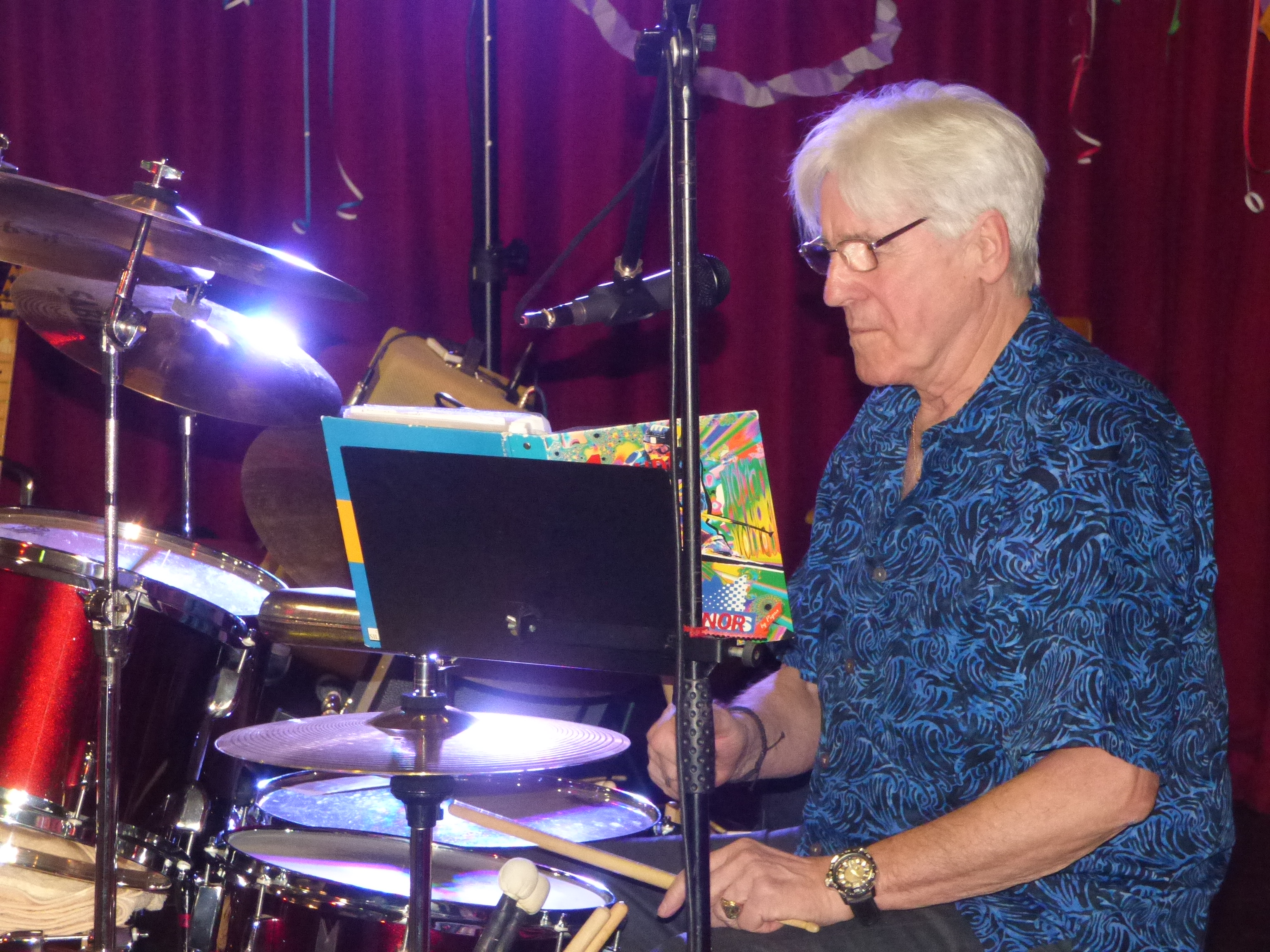 Hauer Rezső a Syconor együttes dobosaként egy 2019 farsangi rendezvényen Pilisszentivánon